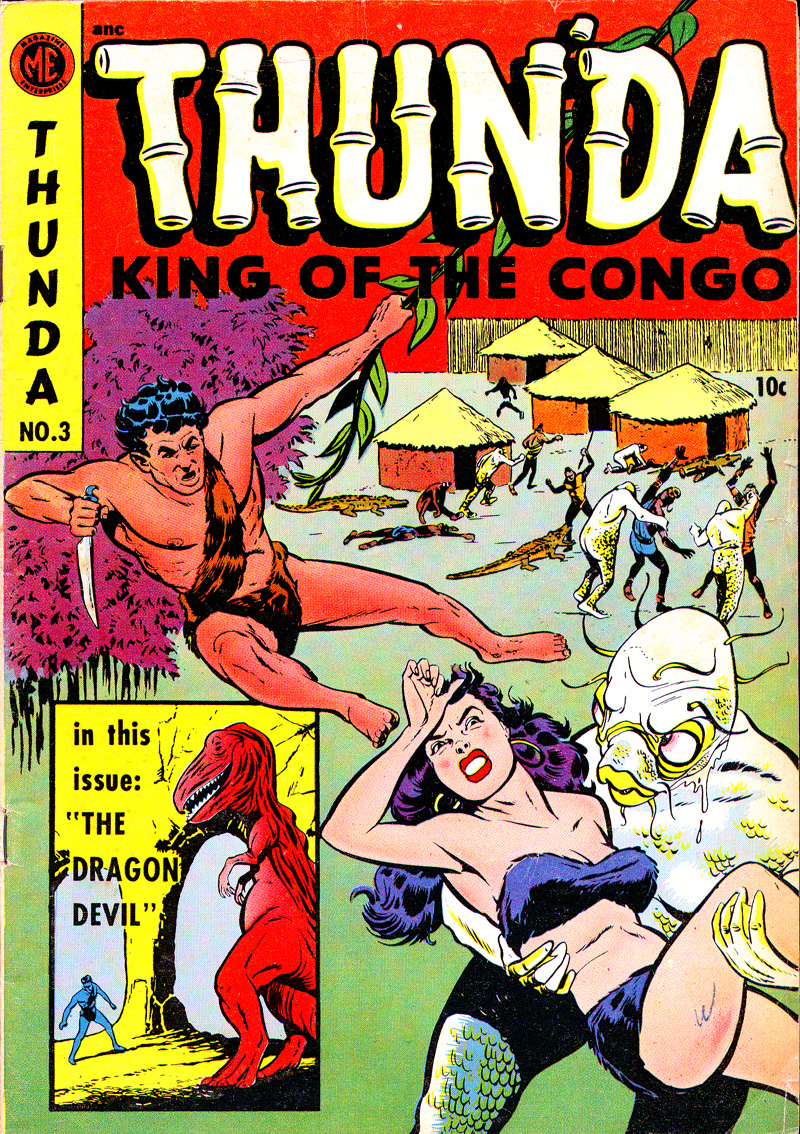 Thun'da, King of the Congo (1952) - Magazine Enterprises